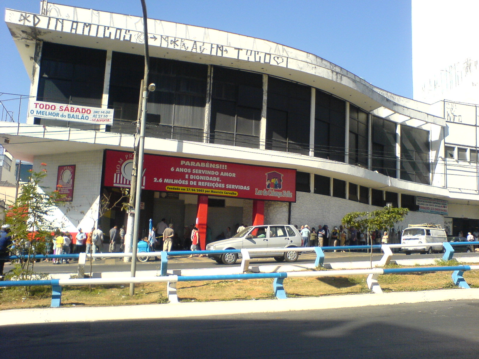 Bom Prato - Restaurante popular onde o almoço custa só R$1,00